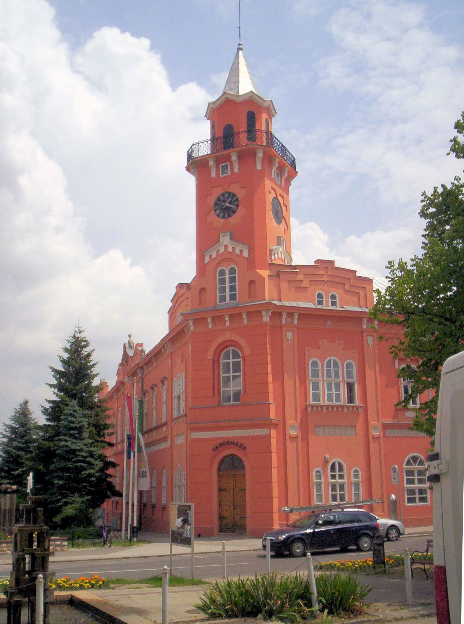 A siklósi városháza – photo taken by uploader User:Csanády in 2006.